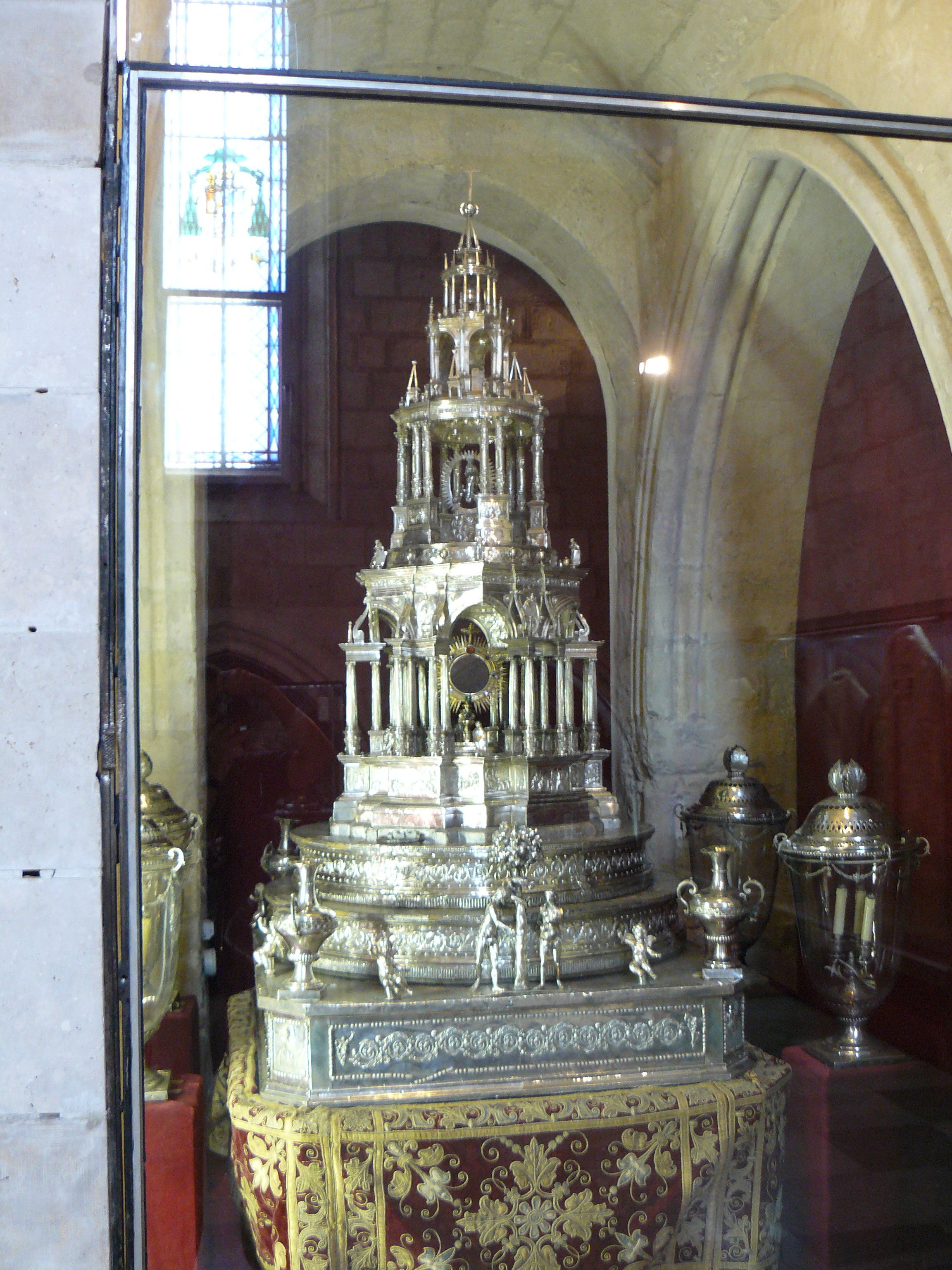 Catedral de Valladolid , Valladolid.